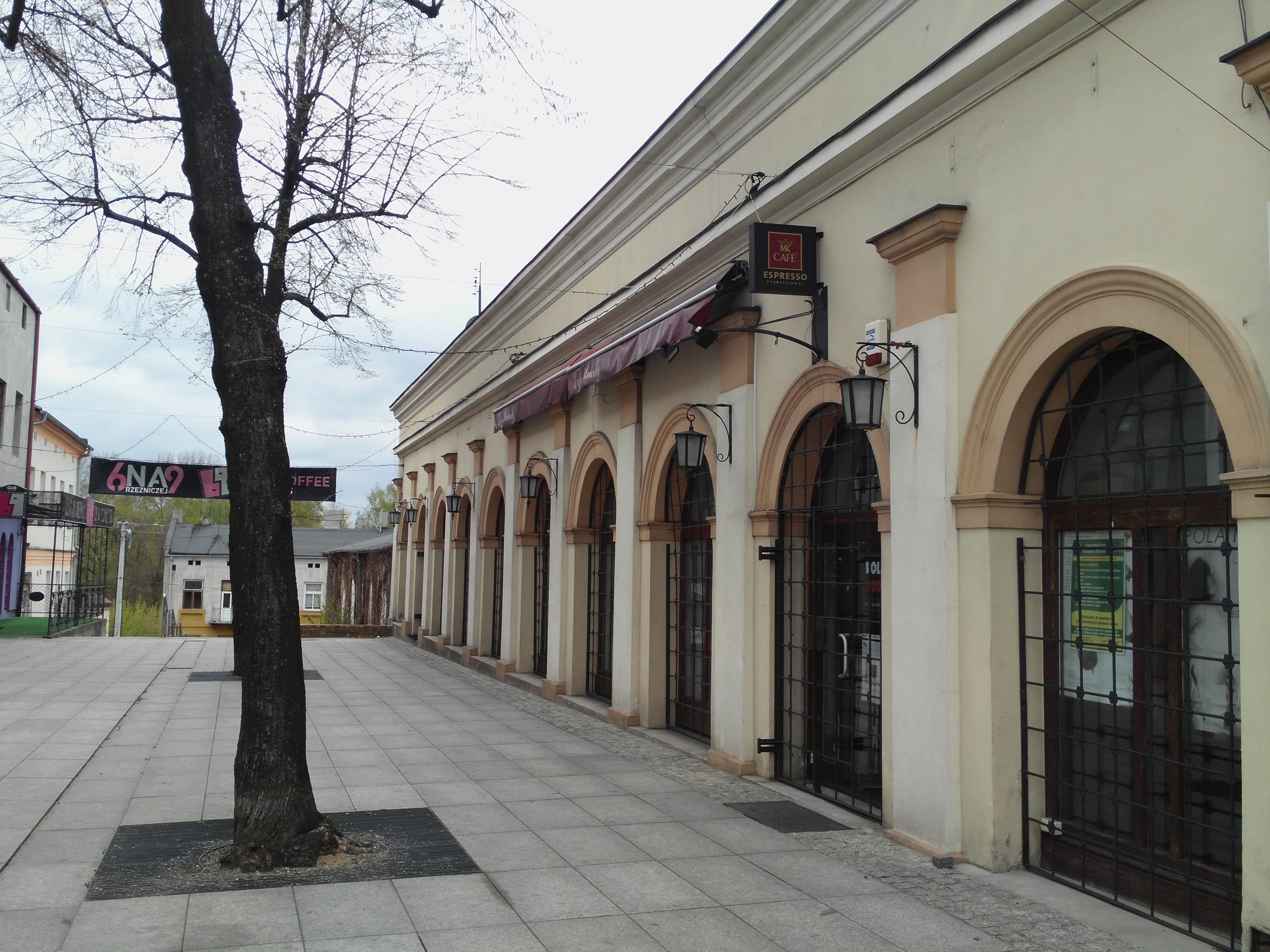 Tomaszowskie jatki. Do lat 70. XX wieku targ mięsny, obecnie Galeria Sztuki „Arkady""